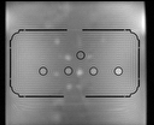 Immagine esemplificativa dell'artifatto di ringing per l'Imaging a risonanza magnetica Categoria:Imaging a risonanza magnetica